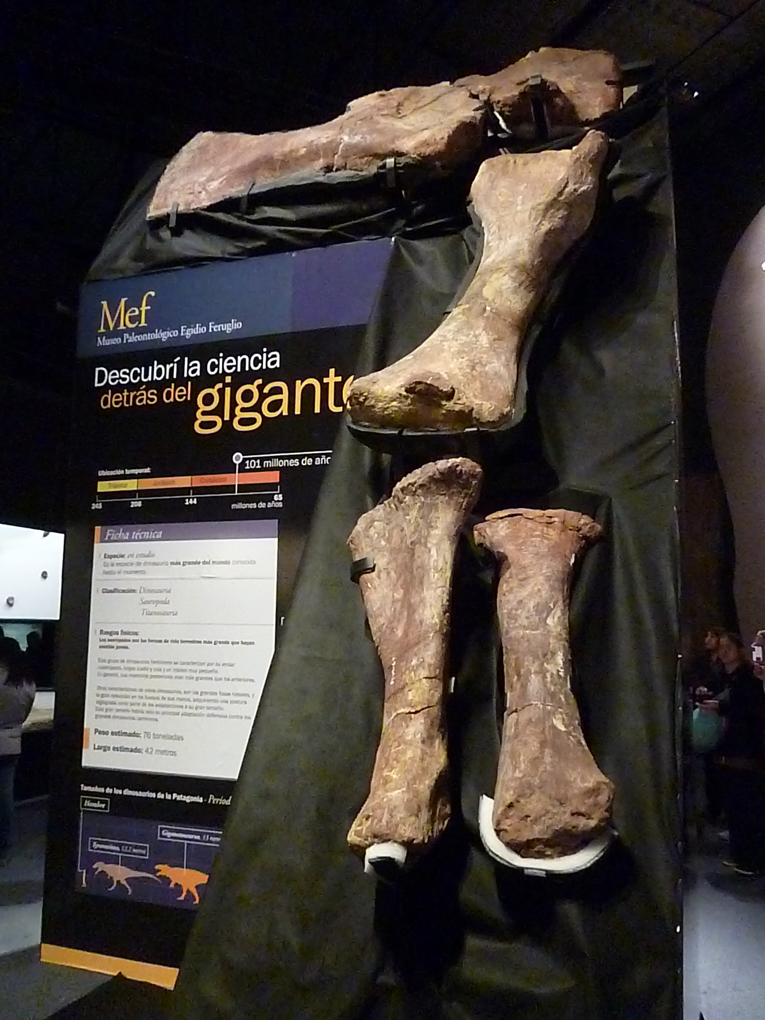 Fósiles del titanosauria del Chubut en el Museo Egidio Feruglio de Trelew, Chubut, Argentina. Descubiertos en 2013 y presentados en 2014, supuestamente se trata del animal terrestre más grande de la historia de la Tierra. Pesaría 4 toneladas más que el Argentinosaurus y su fémur mide más de dos metros.